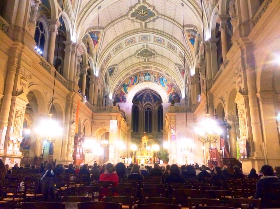 フランスのマドレーヌ寺院。年末のミサ中。